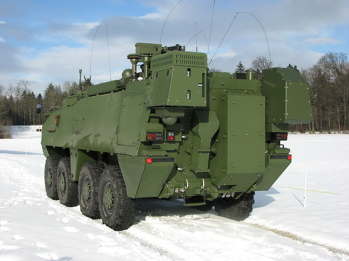 ABC Aufkl Fz der Schweizer Armee